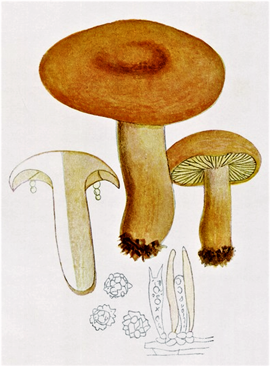 Giacomo Bresadola: Lactarius volemus (Fr.) Fr. (1838)